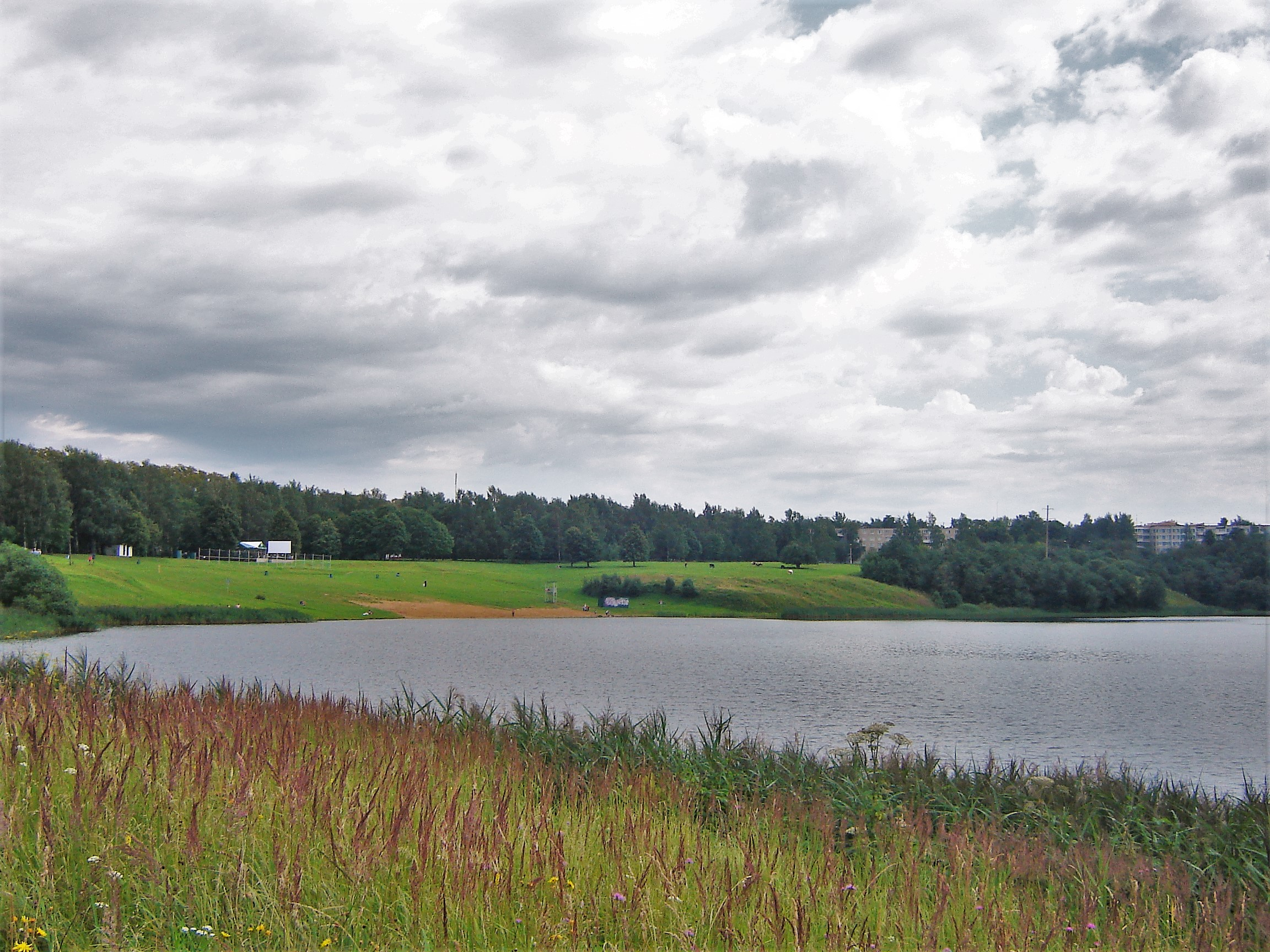 Синьковское водохранилище на речке Варварке возле Новосиньково